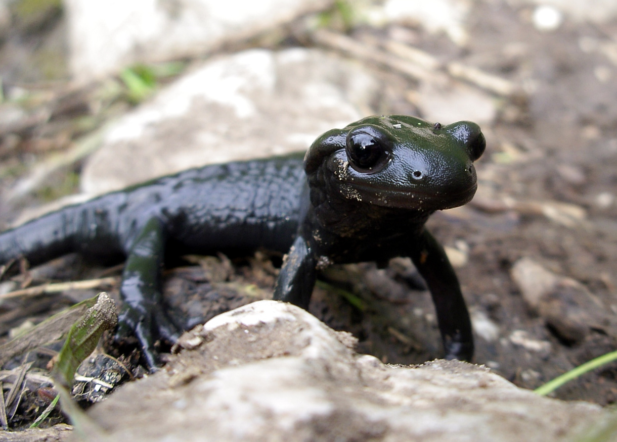 Salamandra atra (Alpine Salamander) on Triglav in Slovenia